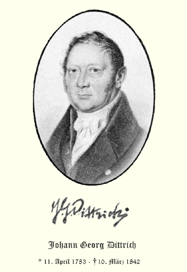 Porträt Johann Georg Dittrich